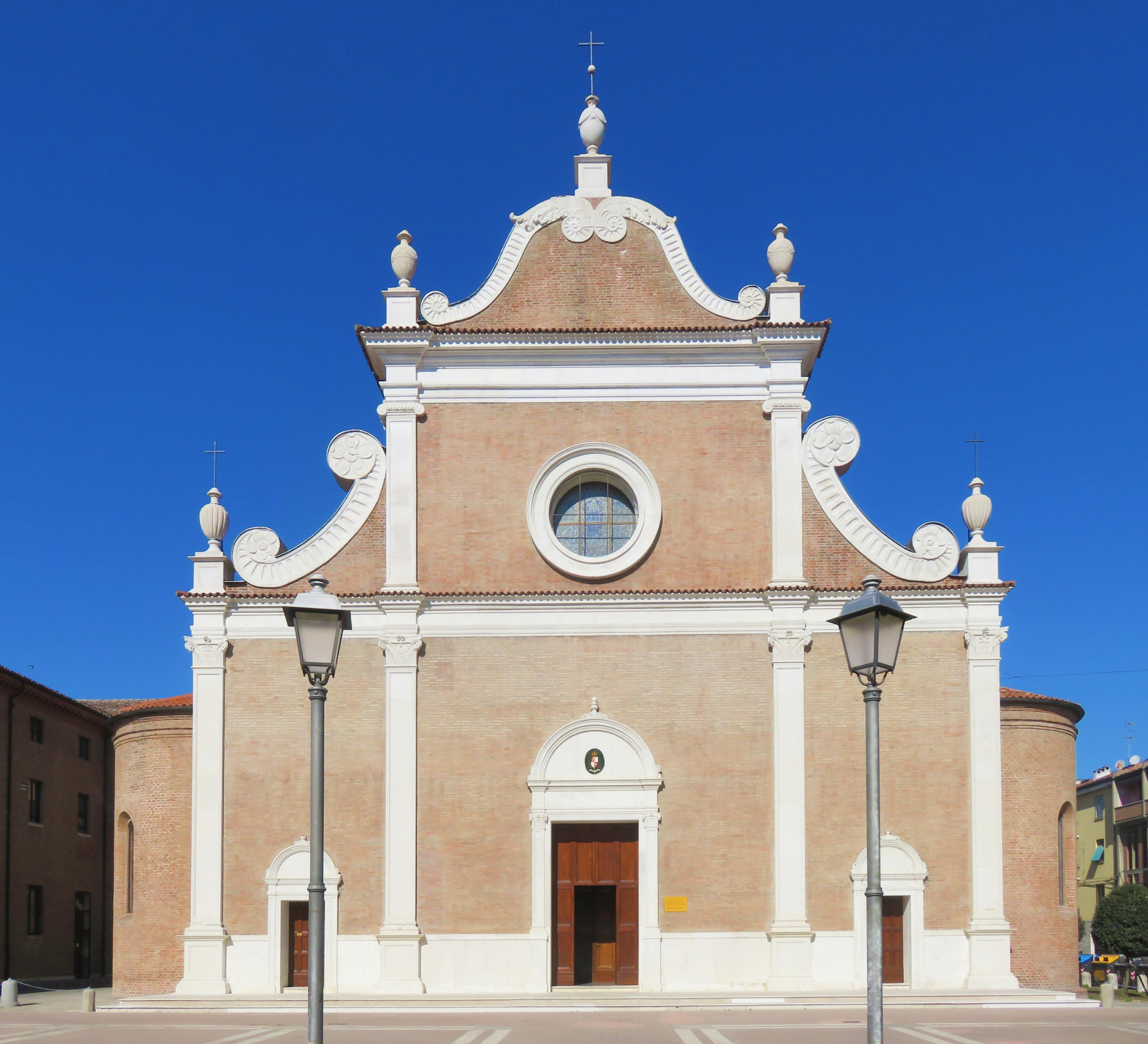 Facciata della chiesa di San Benedetto a Ferrara dopo la riapertura a restauri ultimati.